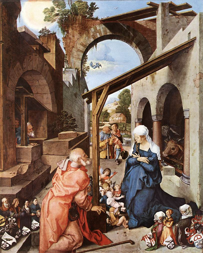 (central panel)